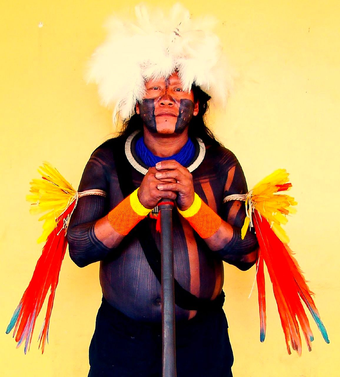 Gente... Hoje voltando pra casa....estava eu no nosso pequeno aeroporto na floresta esperando o vôo e dei de cara com a tribo dos Xicrim... homens mulheres e crianças... claro que aproveitei e fiquei por perto... mesmo sabendo que não posso fotografar... mas fiquei ali observando o movimento deles... Eis que mais tarde aparece ELE... O Cacique... chegando de uns dos vôos fretados por eles... sim os Índios fretam aviões ... são poderosos ... vixe... nem conto pra vcs! Pedi para um líder que fala português para tirar uma foto dele... bom está aí o resultado... VIAJAR PRA CASA DEPOIS DE 40 DIAS DE TRABALHO CAMPO ******* NÃO TEM PREÇO FOTO DO CACIQUE DOS XICRINS ******** 20 REAIS Bom... é isso aí! tive que pagar pra tirar uma foto dele... mas ok... tudo tem um preço na vida... mas o melhor de tudo... é que já to em casa...